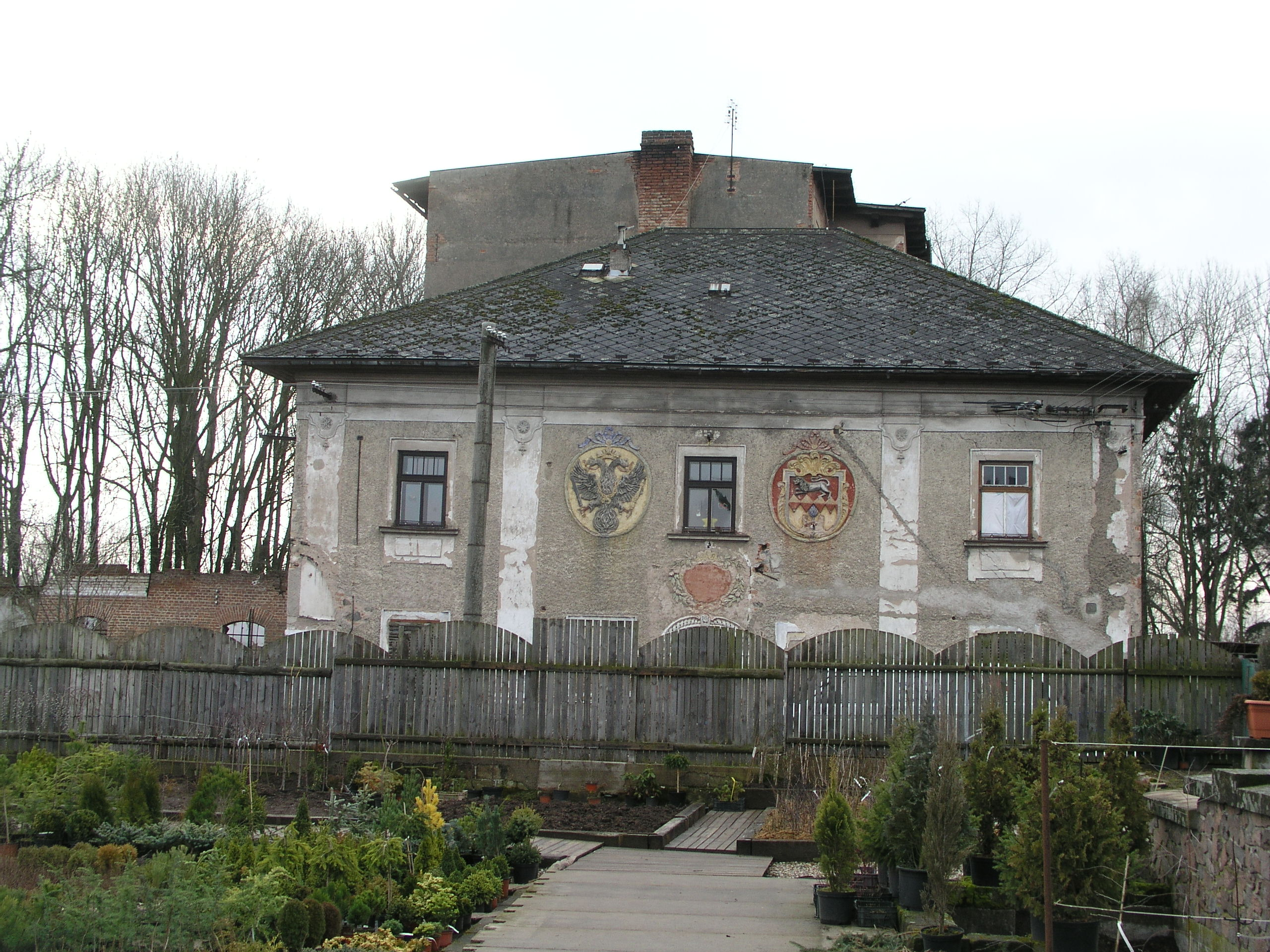 Morávkův vodní mlýn, s omezením: bez mlýnice, špýcharu, pozůstatků hosp. budov a st. p. č. 10/2 (Opatovice nad Labem), Klášterní 48, Opatovice nad Labem